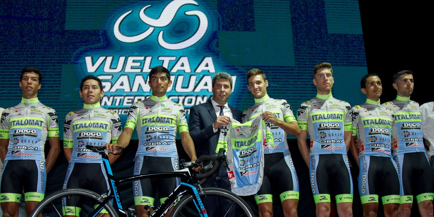 Vuelta a San Juan 2017 - Equipo Italomat-Dogo (Argentina) Depicted team: Italomat-Dogo